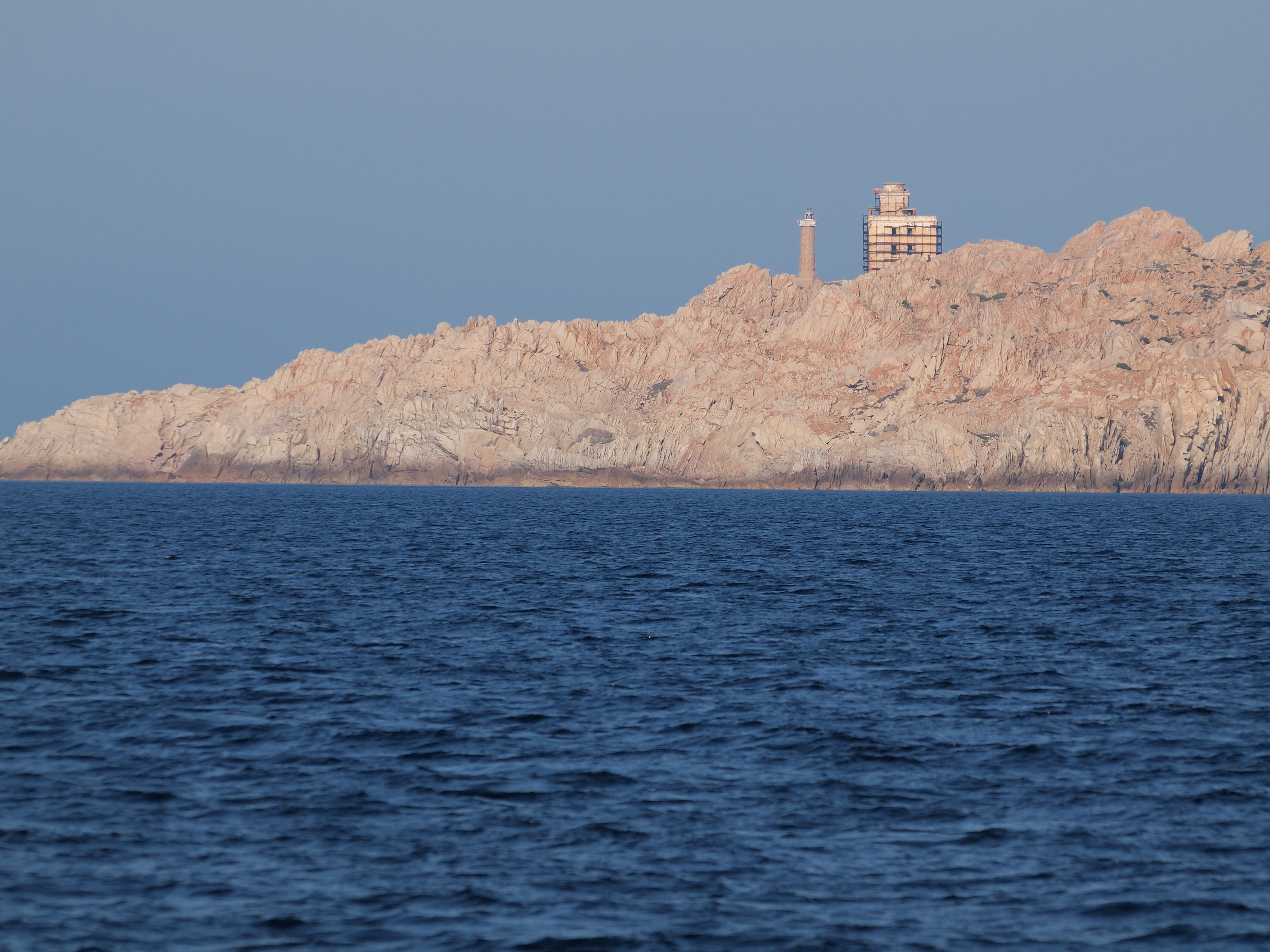 Leuchtturm auf der Insel Razzoli, aus südlicher Sicht, Nord-Sardinien (41.307181N; 9.34001E)